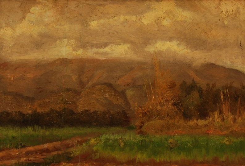 Paesaggio di campagna, olio su tavola, 33.5 x 23.3 cm., coll. privata